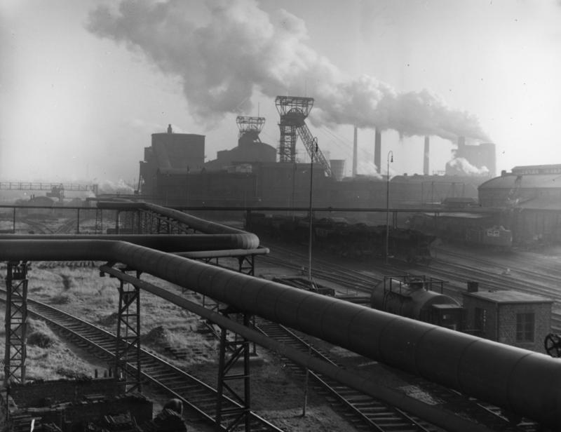 Zeche Concordia Oberhausen IV/V Concordia Bergbau AG Oberhausen, seit 1900, täglich 3500 Fettkohle/Kokerei täglich 1300 t.